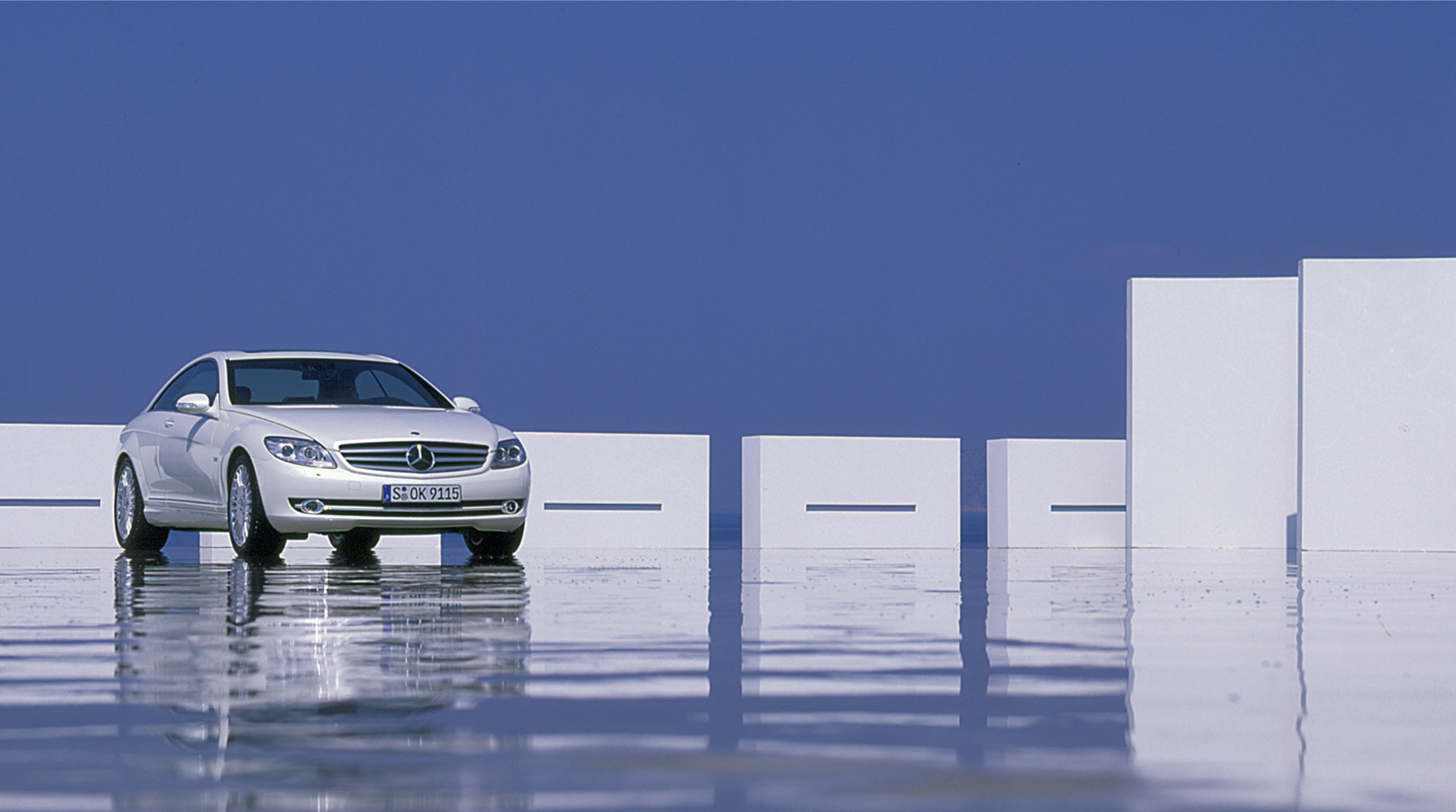 Fotoshoot für Mercedes-Benz in der Dependance in Griechenland